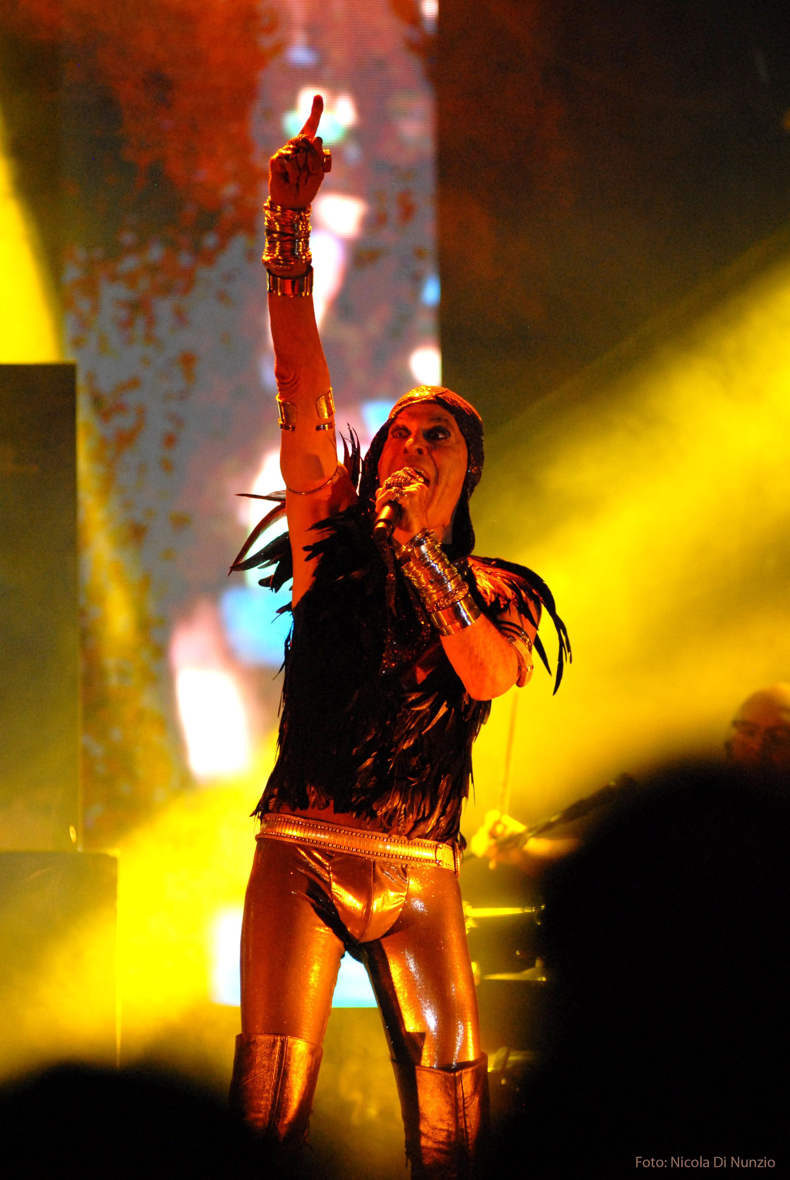 Ney Matogrosso